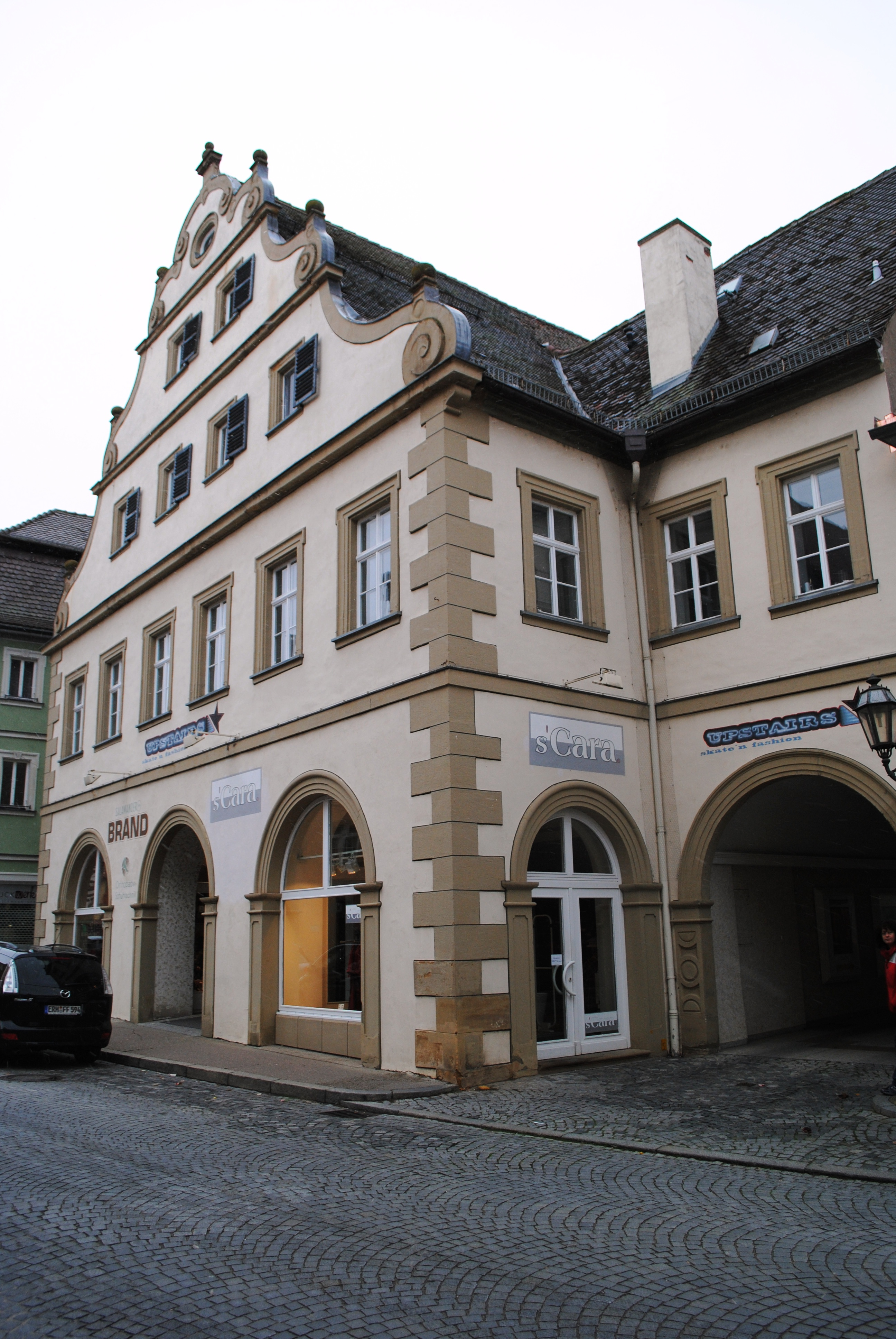 Ehemaliger Zehnthof, Hauptstraße 14, Volkach, Kellerei des Würzburger Domkapitels, 1545 zum Amtshaus umgestaltet, 1929 Gendarmerie, heute Wohn- und Geschäftshaus, Hauptbau, zweigeschossiger giebelständiger Satteldachbau mit Volutengiebel, Renaissance, bez. 1545, seitlich angegliederte Durchfahrt; 1974 grundlegend zum Geschäftshaus umgebaut; D-6-75-174-41